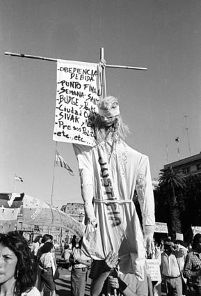 Resistimos y luchamos contra el proyecto pol’tico de impunidad del gobierno constitucional. Resistimos y luchamos contra la obediencia debida y resistimos y luchamos contra toda forma de amnist’ía. Se cumplen 10 años de la formación de Madres de Plaza de Mayo